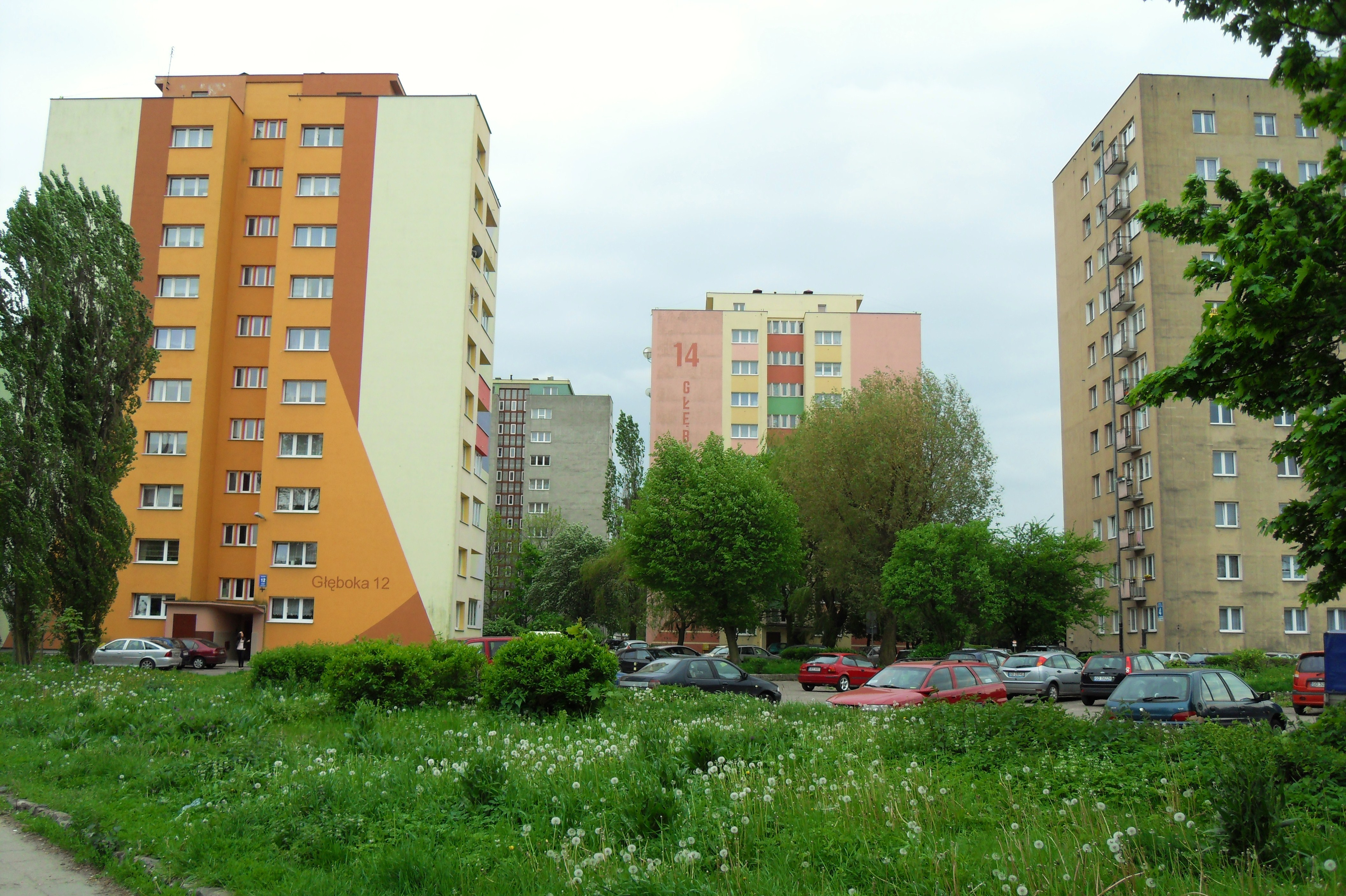 Gdańsk Knipawa (Rudno), ul. Głęboka 12 i 14.